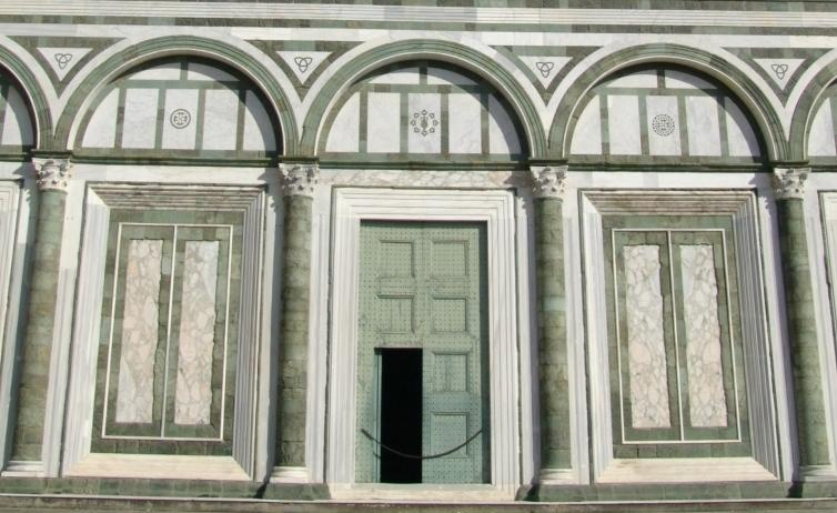 Bildbeschreibung: Blendarkaden als Marmorinkrustation am Portal von San Miniato al Monte in Florenz Fotograf/Zeichner: Leipnizkeks, bearbeitet von Matthias Holländer Datum: 10.03.2005 Sonstiges: ...